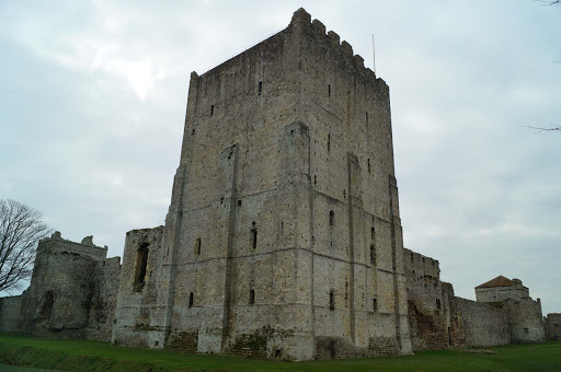 Вид с боку